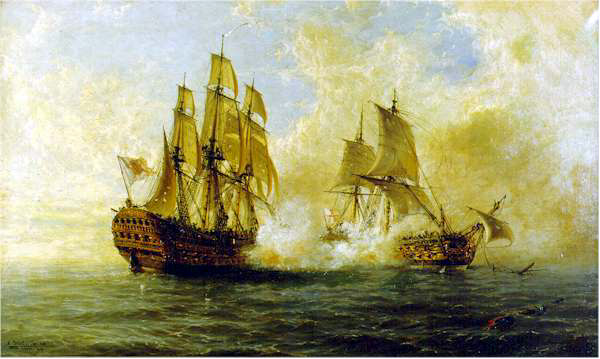 Combate del navío Glorioso con el británico Darmouth (19 de octubre de 1747)